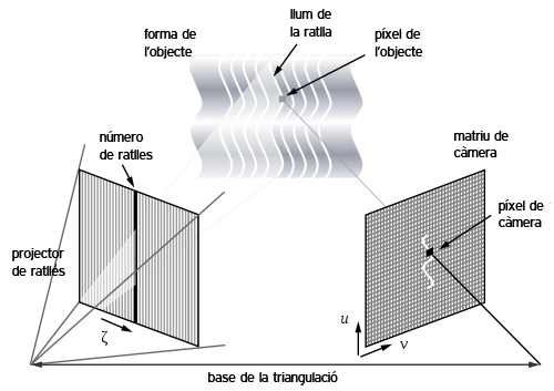 La imatge mostra la deformació d'una sola franja projectada sobre una superfície 3D. La irregularitat de la ratlla permet una recuperació exacta de les coordenades 3D de tots els detalls i caracterìstiques de la seva superfície.